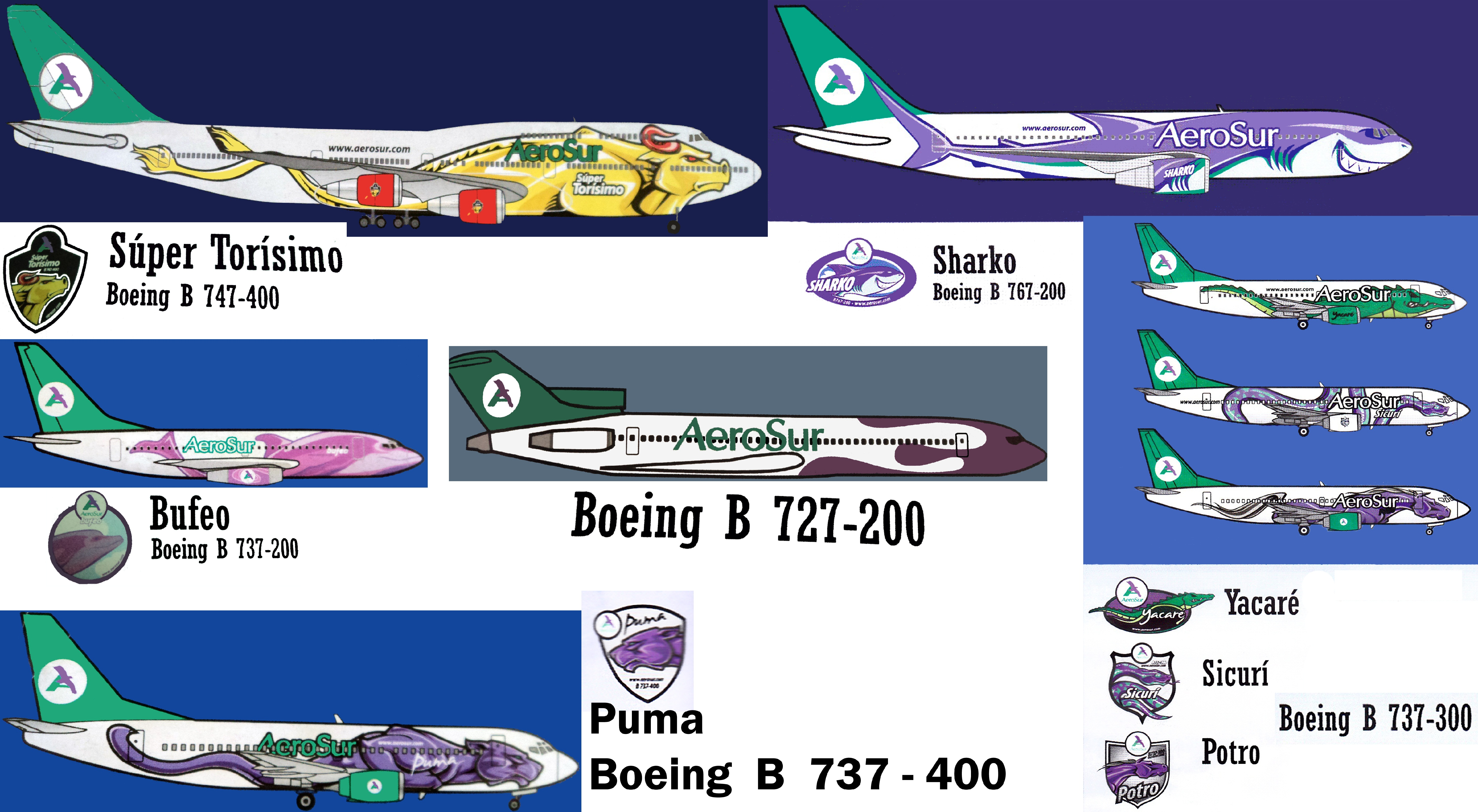 Gráfico de la flota de Aerosur al momento de su cese de operaciones.